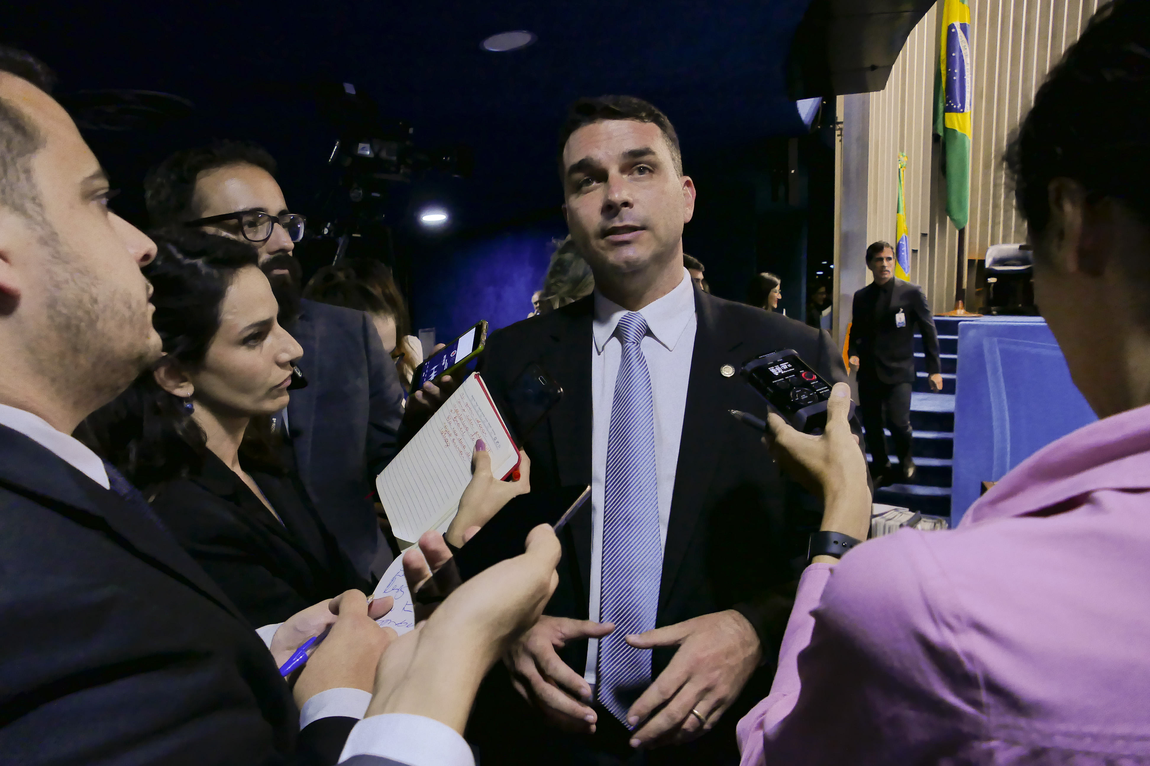 Plenário do Senado Federal durante sessão deliberativa ordinária. Senador eleito Flávio Bolsonaro (PSL-RJ) concede entrevista.